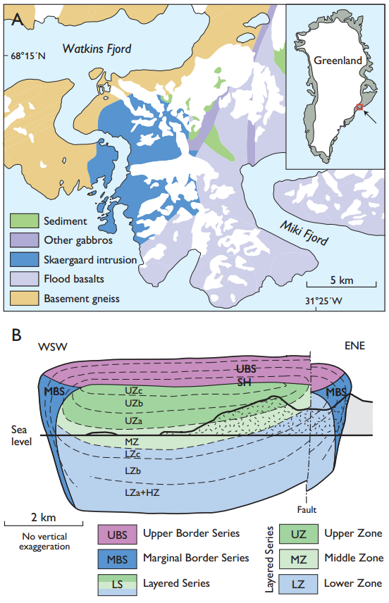 Kort over og snit gennem Skaergaard-intrusionen